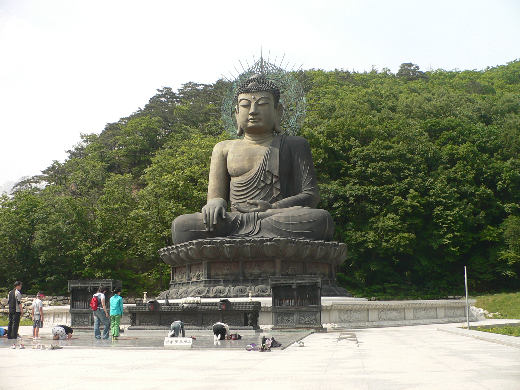 Giant Buddha statue in Seoraksan (Mt.Seorak), Gangwon-do, South Korea